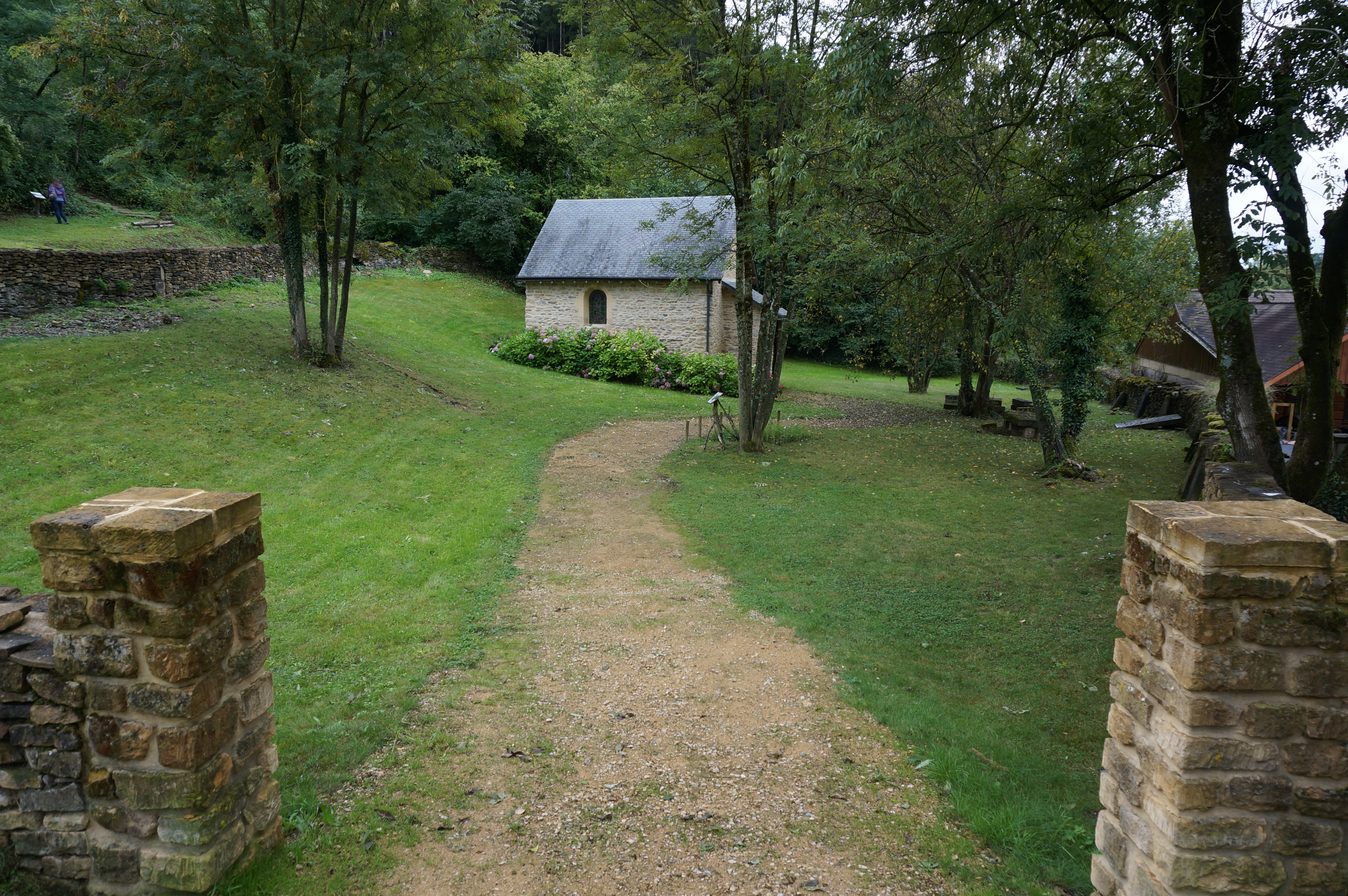 Chapelle dédiée à Quentin et son cimetière à Aiglemont .